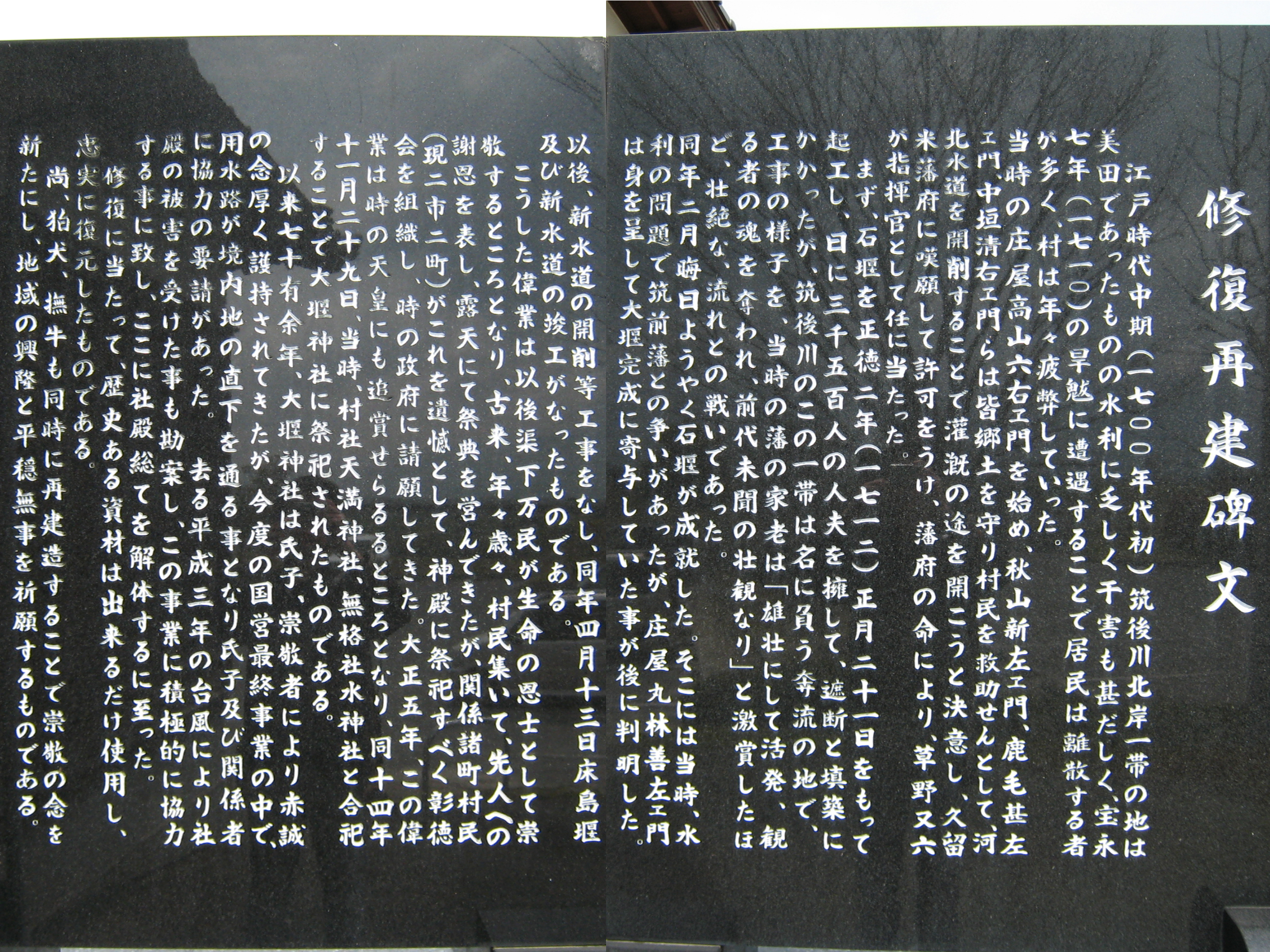 草野又六と五庄屋が合祀された、大堰神社の修復再建碑文